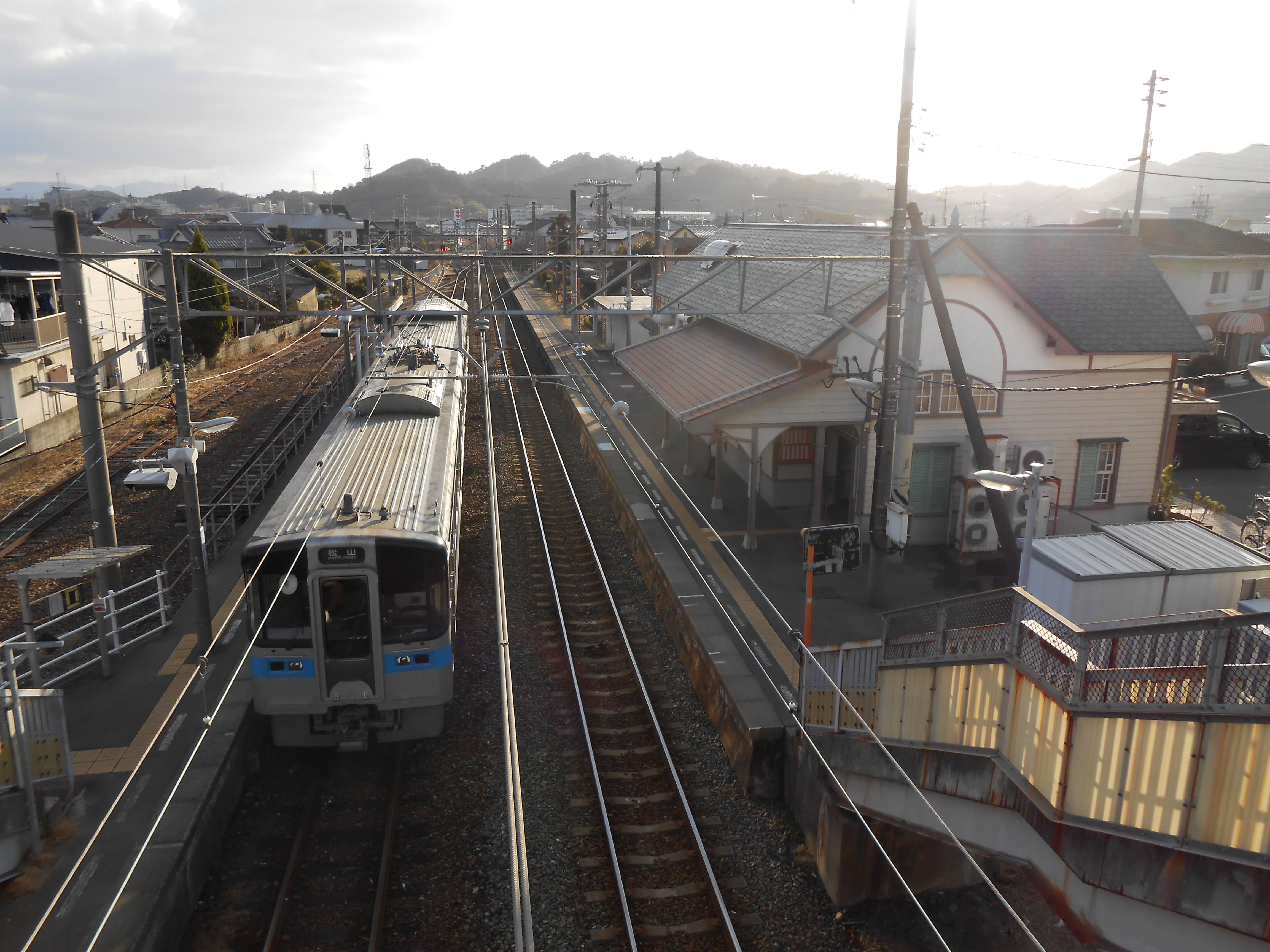 伊予和気駅構内